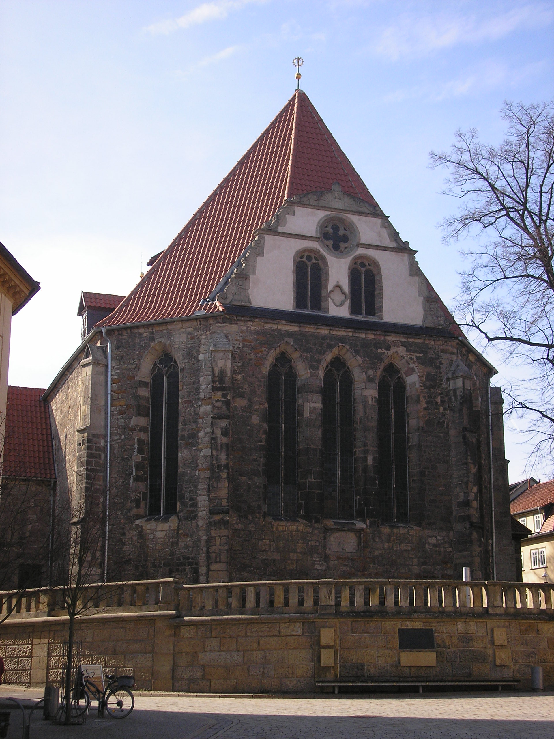 Die Bachkirche in Arnstadt (Thüringen).